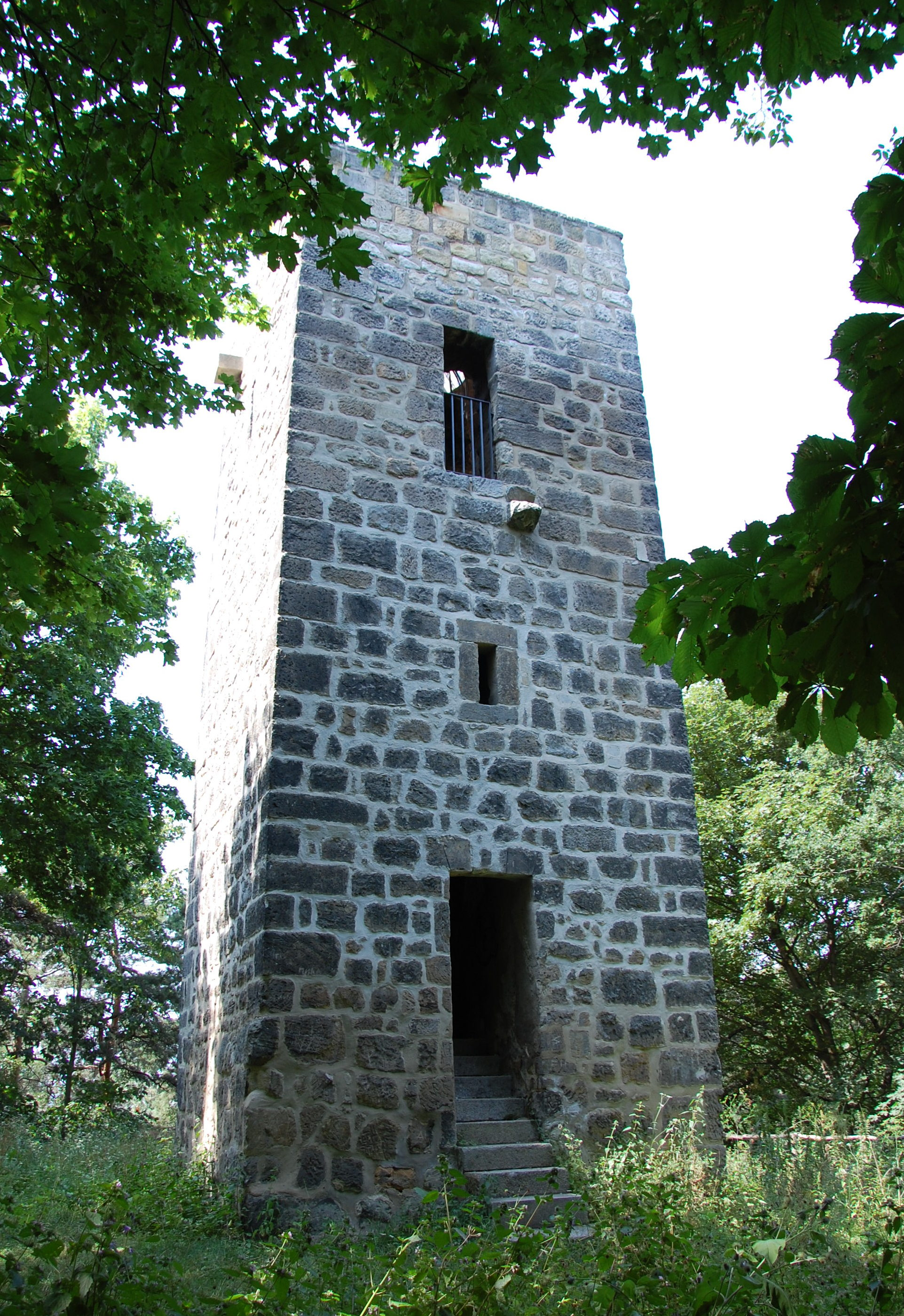 Steinholzwarte bei Quedlinburg